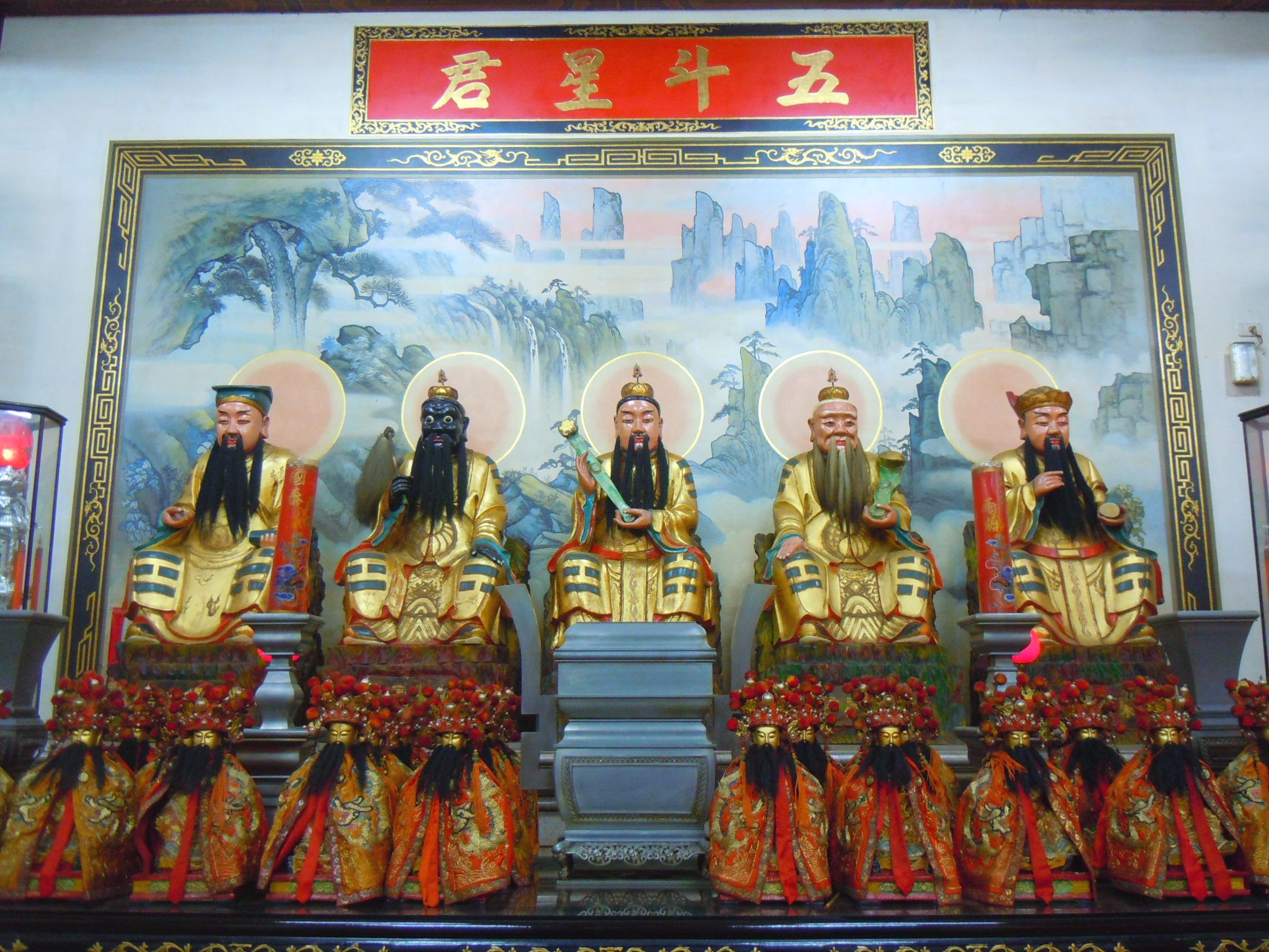 中文（台灣）: 臺中市北區梅川西路三段109號－元保宮。